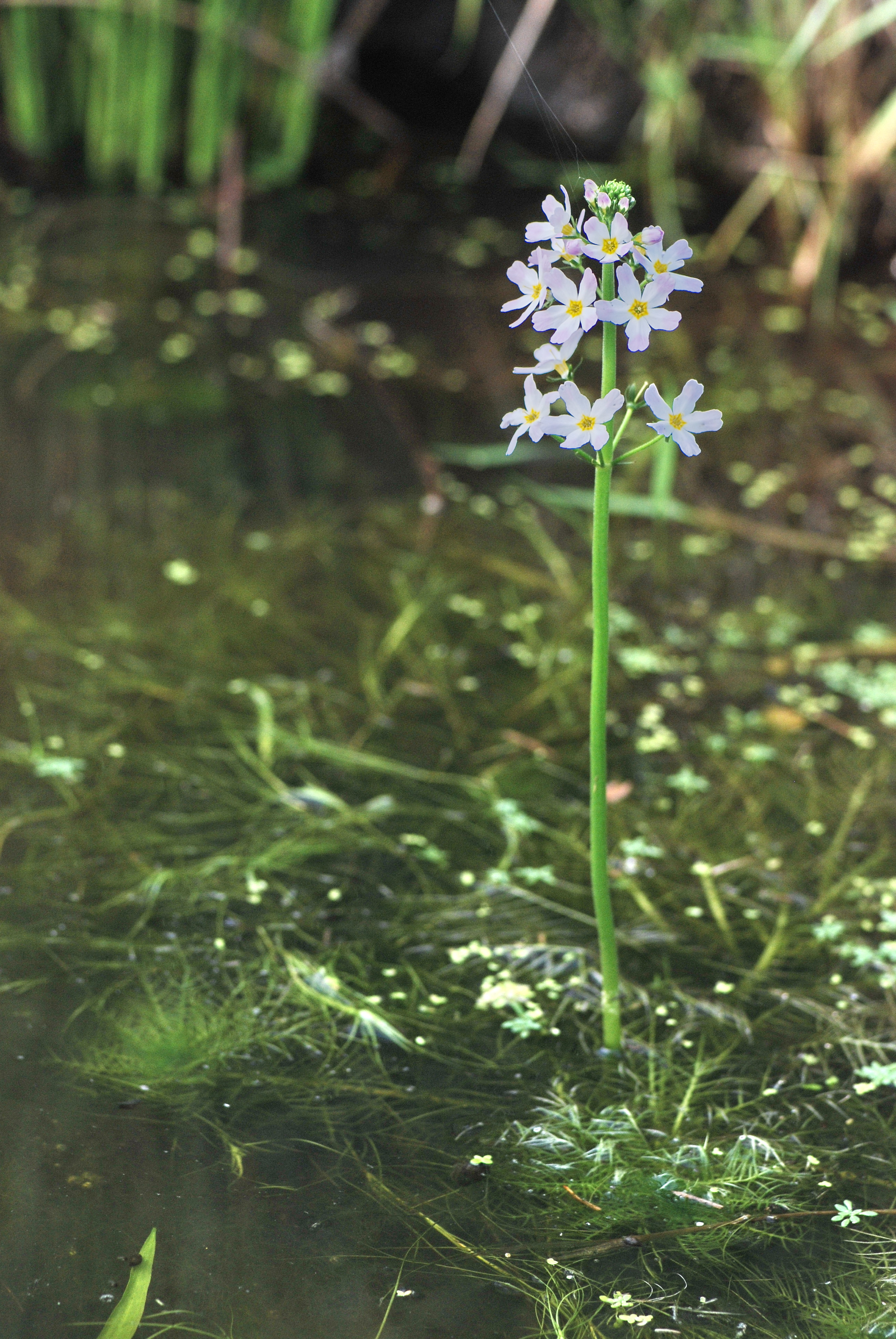 Hottonia palustris Saint-Michel en Brenne (Indre), France